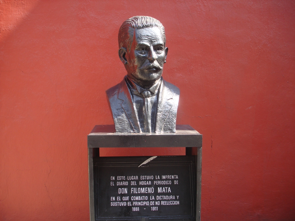 Busto de Filomeno Mata Rodríguez en el Centro Histórico de la Ciudad de México, en el Exterior del Museo del Ejército y Fuerza Aérea Mexicanos ubicado en la calle de Filomeno Mata